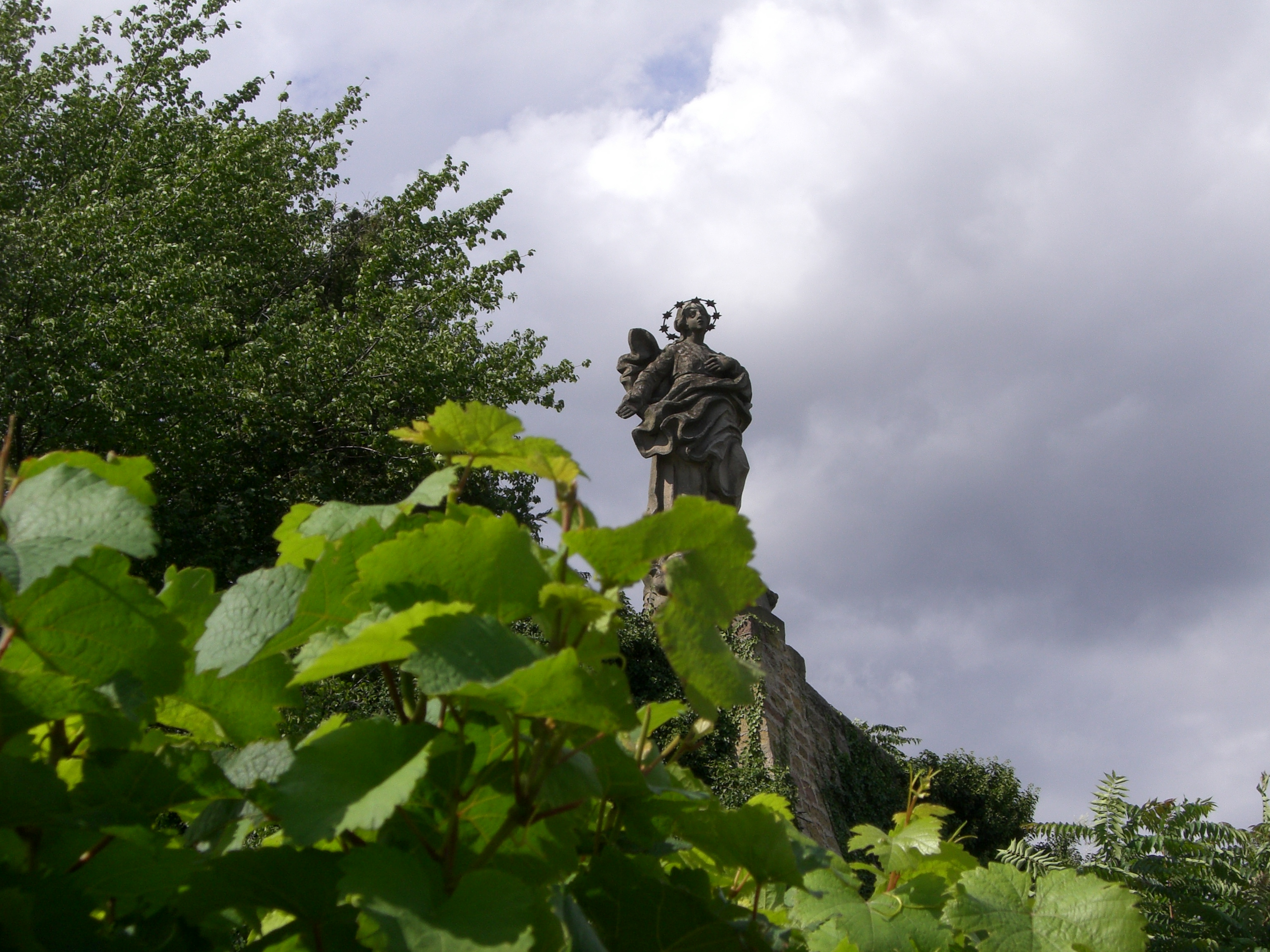 Die Madonnen-Statue im Forster Mariengarten